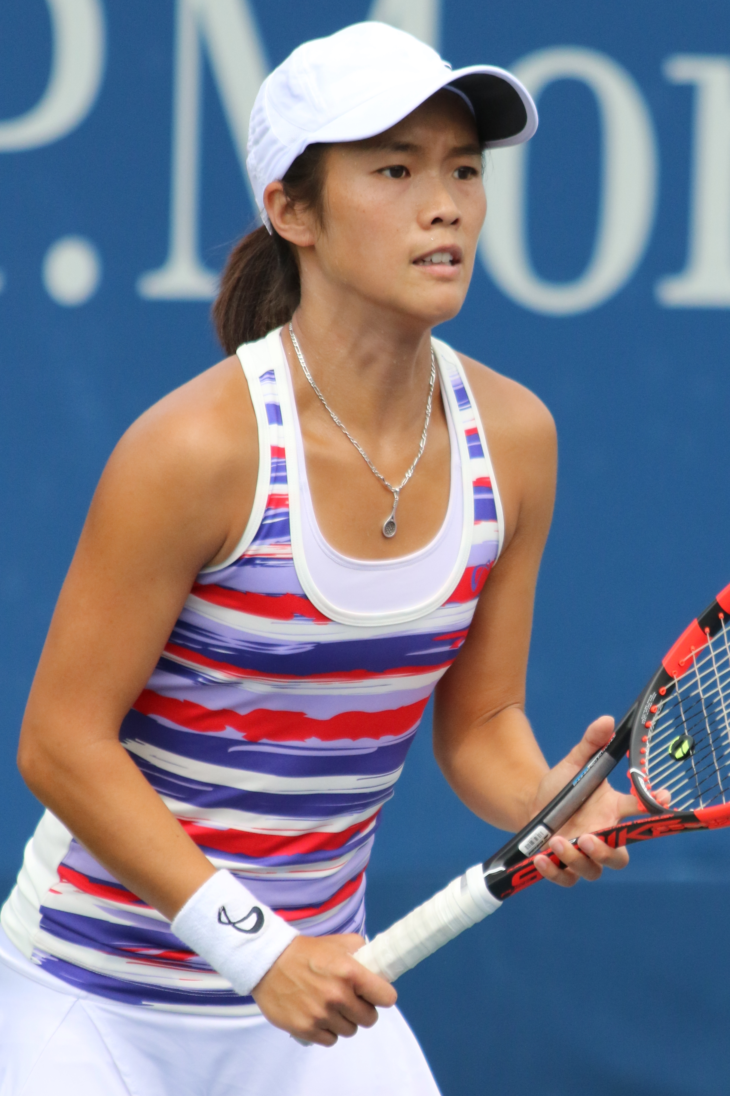 Lao US16 (4)